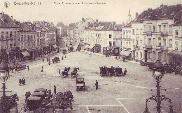 Place Fernand Cocq à Ixelles (Bruxelles) vers 1903 vue vers la Chaussée d'Ixelles.